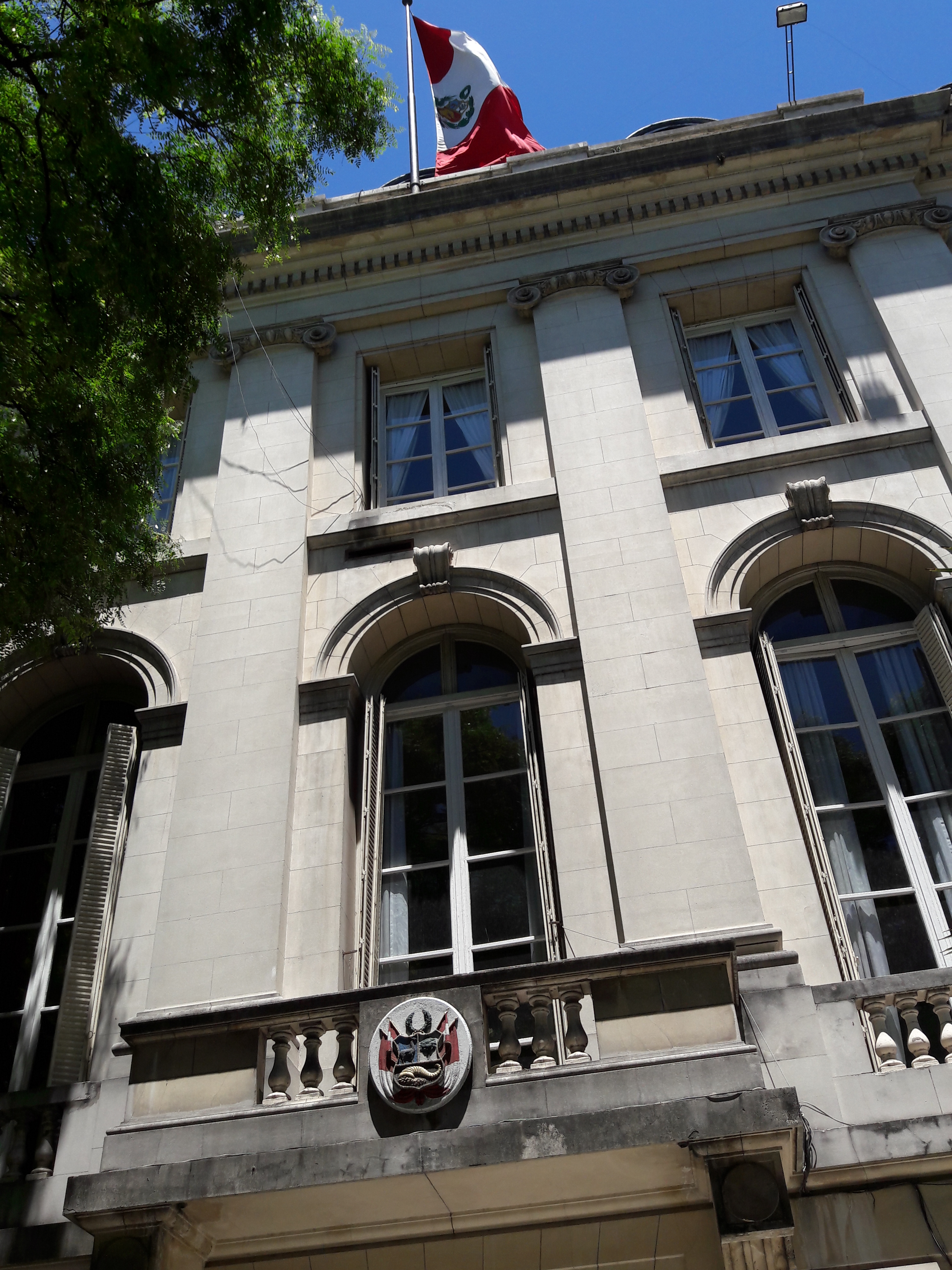 Embajada del Perú, Palermo, Buenos Aires, Argentina.